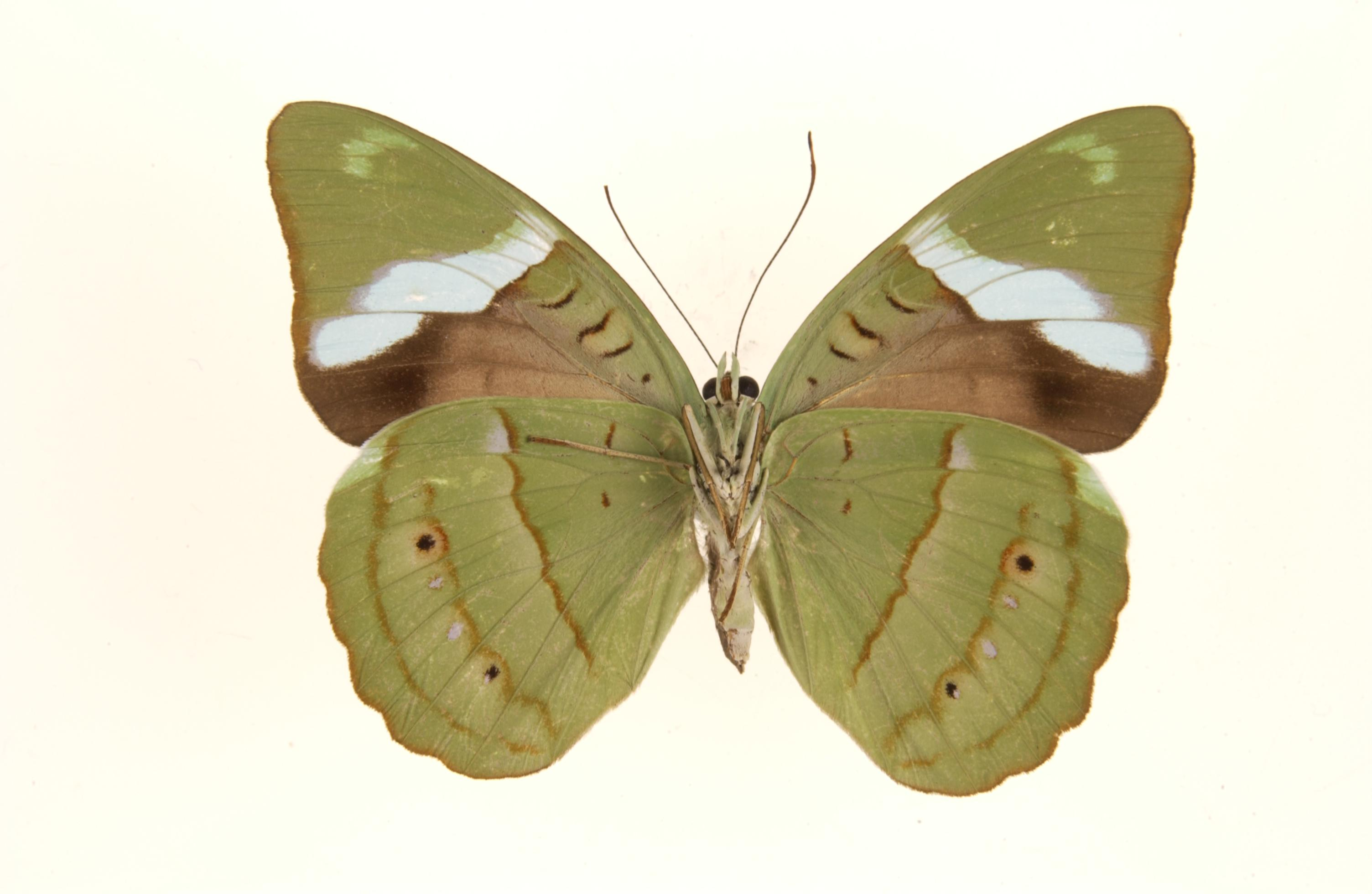 Nessaea obrina Underside